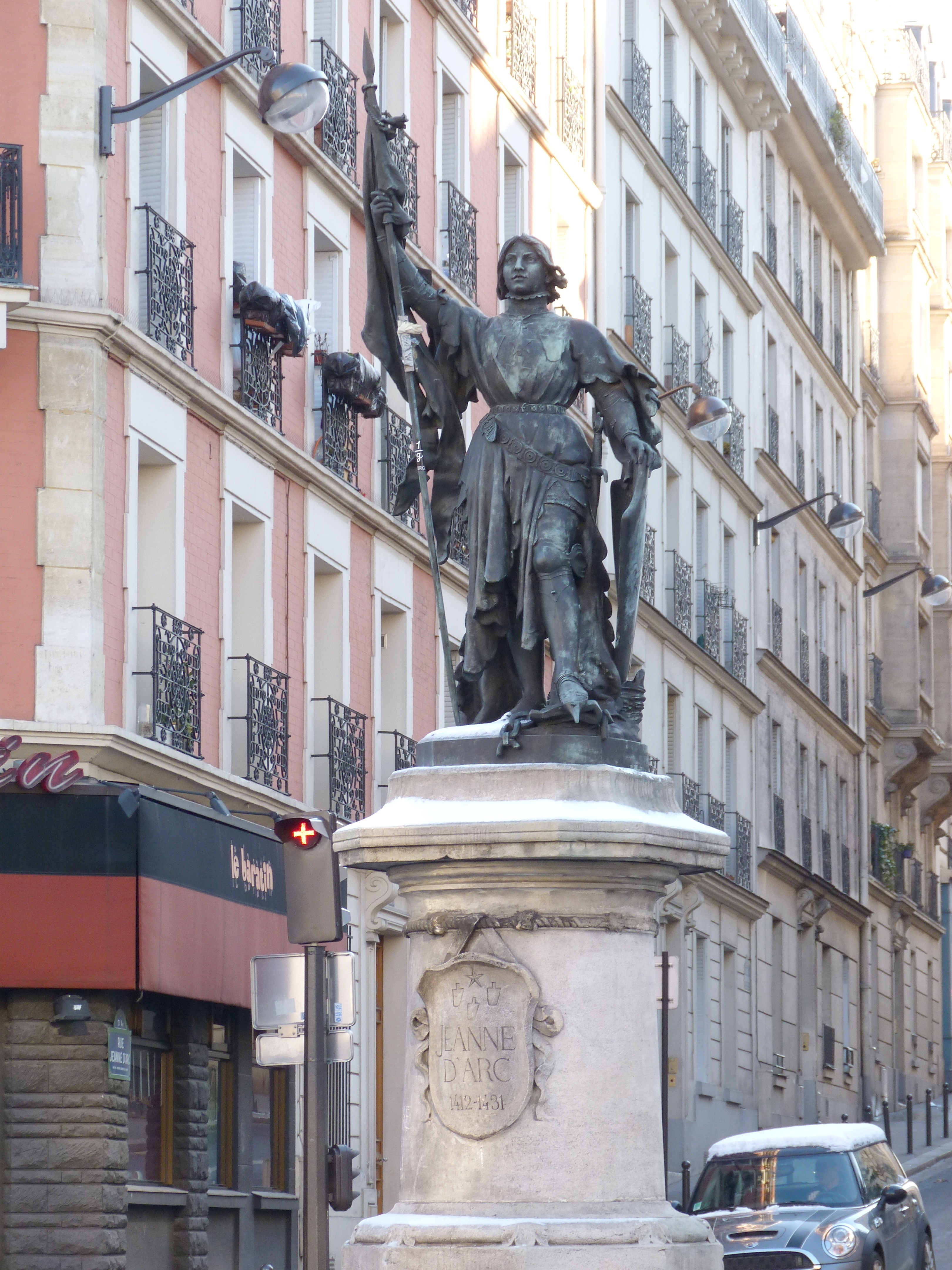 Jeanne d'Arc en armure (1887), statue par Émile-François Chatrousse (1829-1896), installée en 1891 à l'extrémité de la rue Jeanne d'Arc aboutissant au boulevard Saint-Marcel, Paris (13e arrond.)